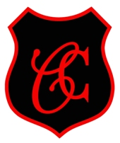 Escudo